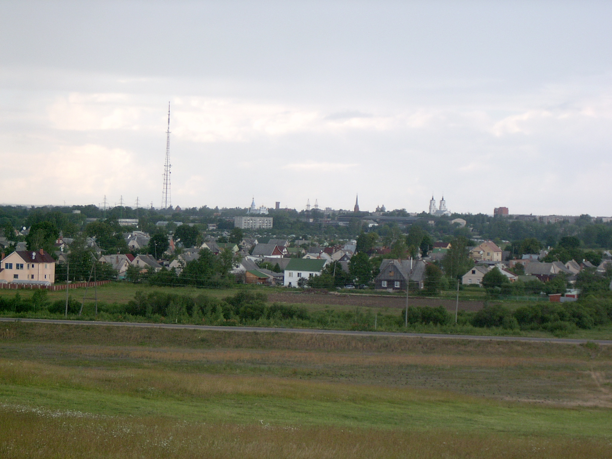 Laucesa Parish, Latvia